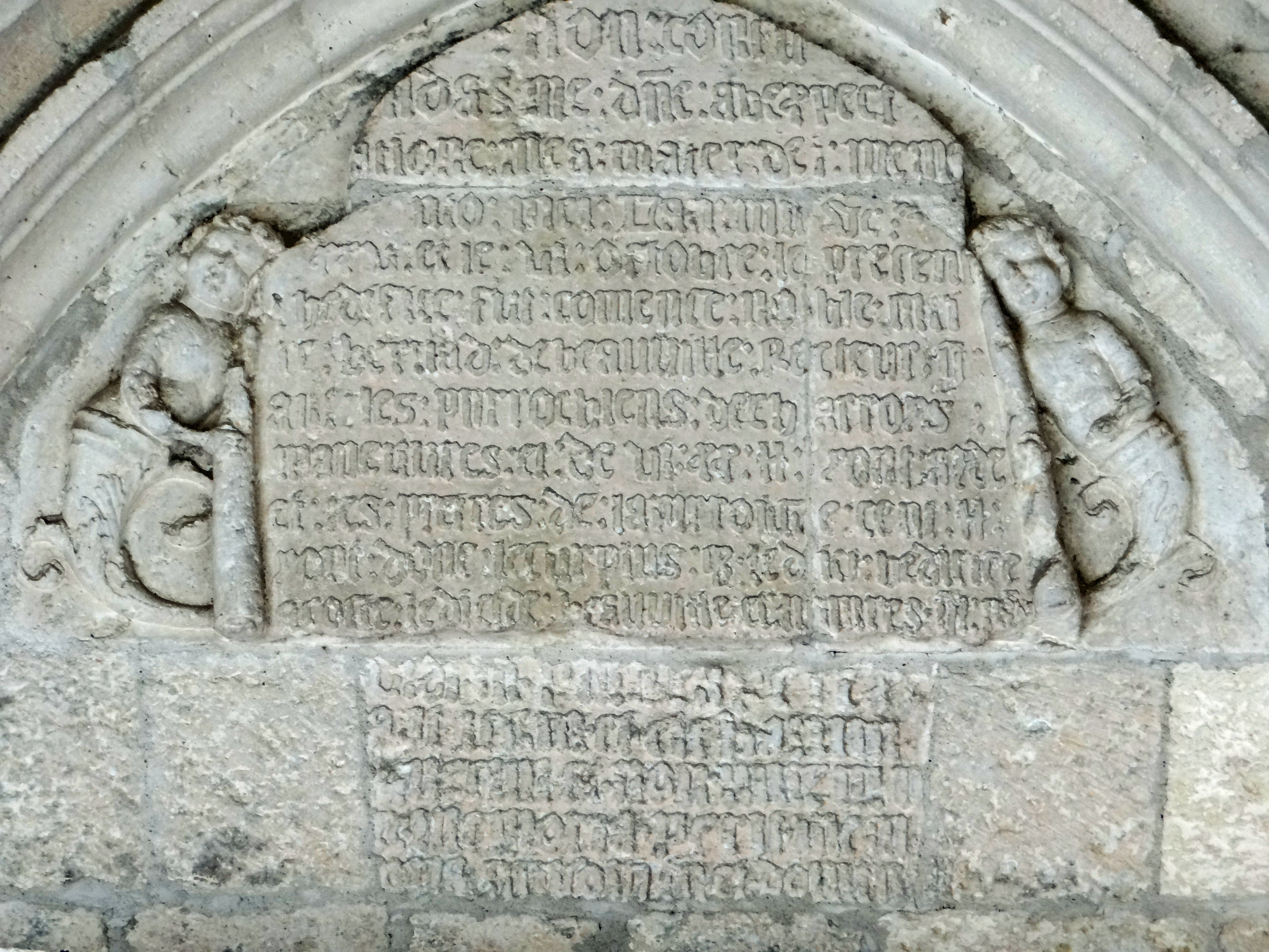 Saint-Maurin - Église Saint-Martin - Inscription du tympan du portail